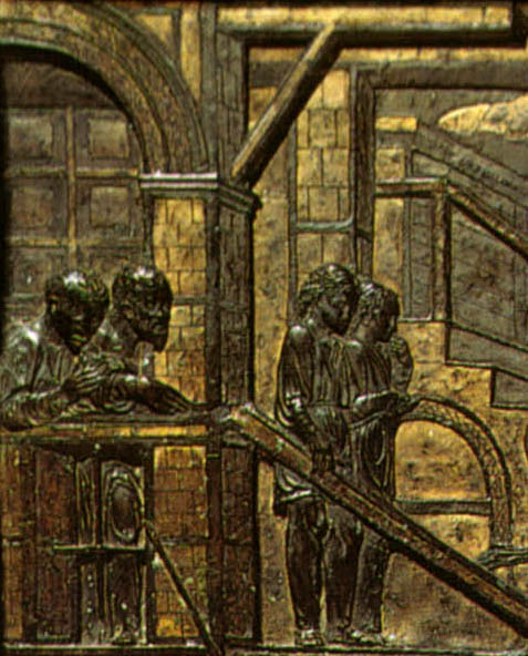 Donatello, miracolo del figlio pentito, dettaglio 2